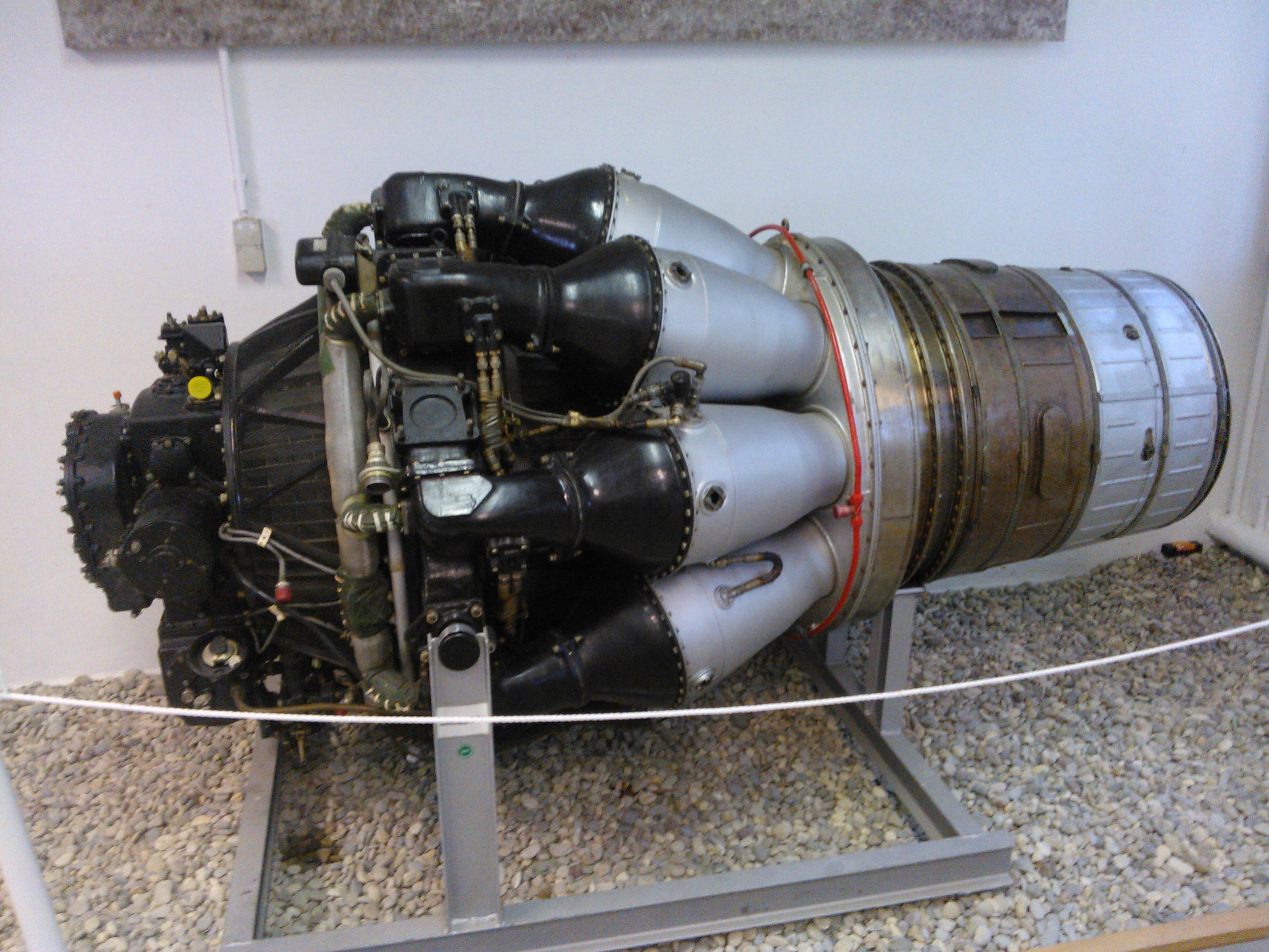 Strahltriebwerk Rolls-Royce Derwent